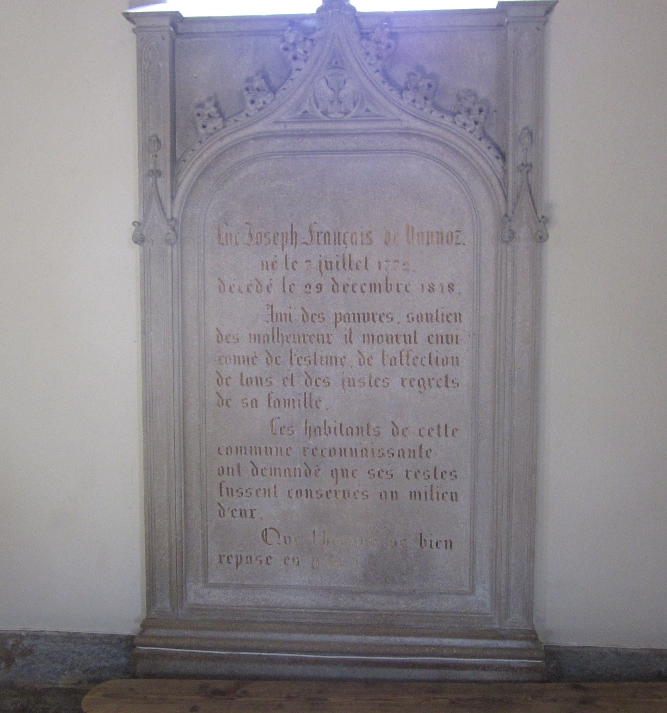 Vannoz (Jura) - église - stèle en remerciement à Joseph-François de Vannoz, bienfaiteur de la commune, mort en 1848